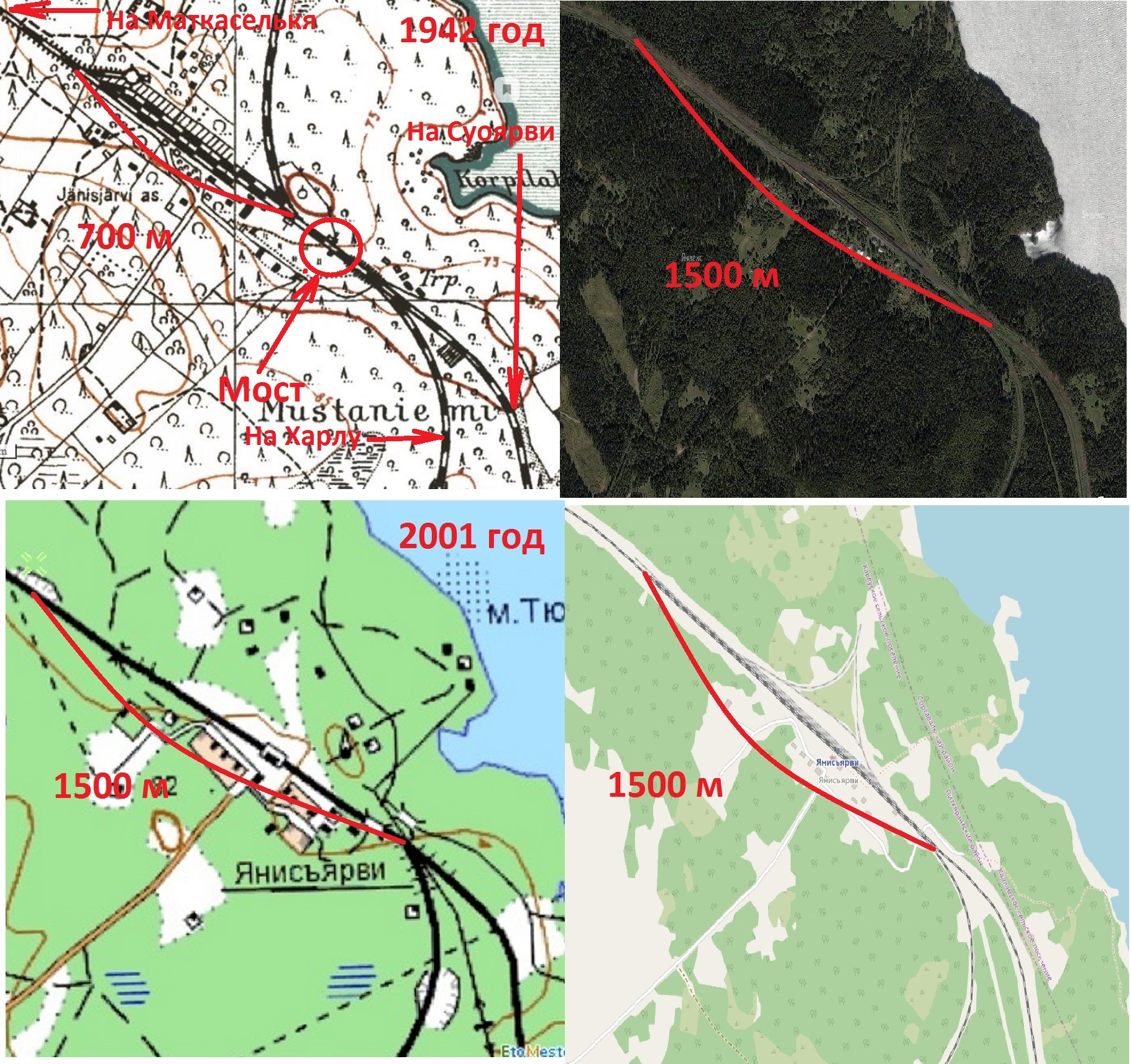 Янисъярви